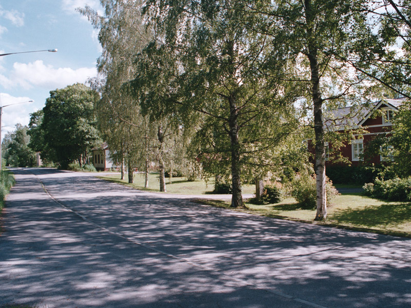 Lavian raittia